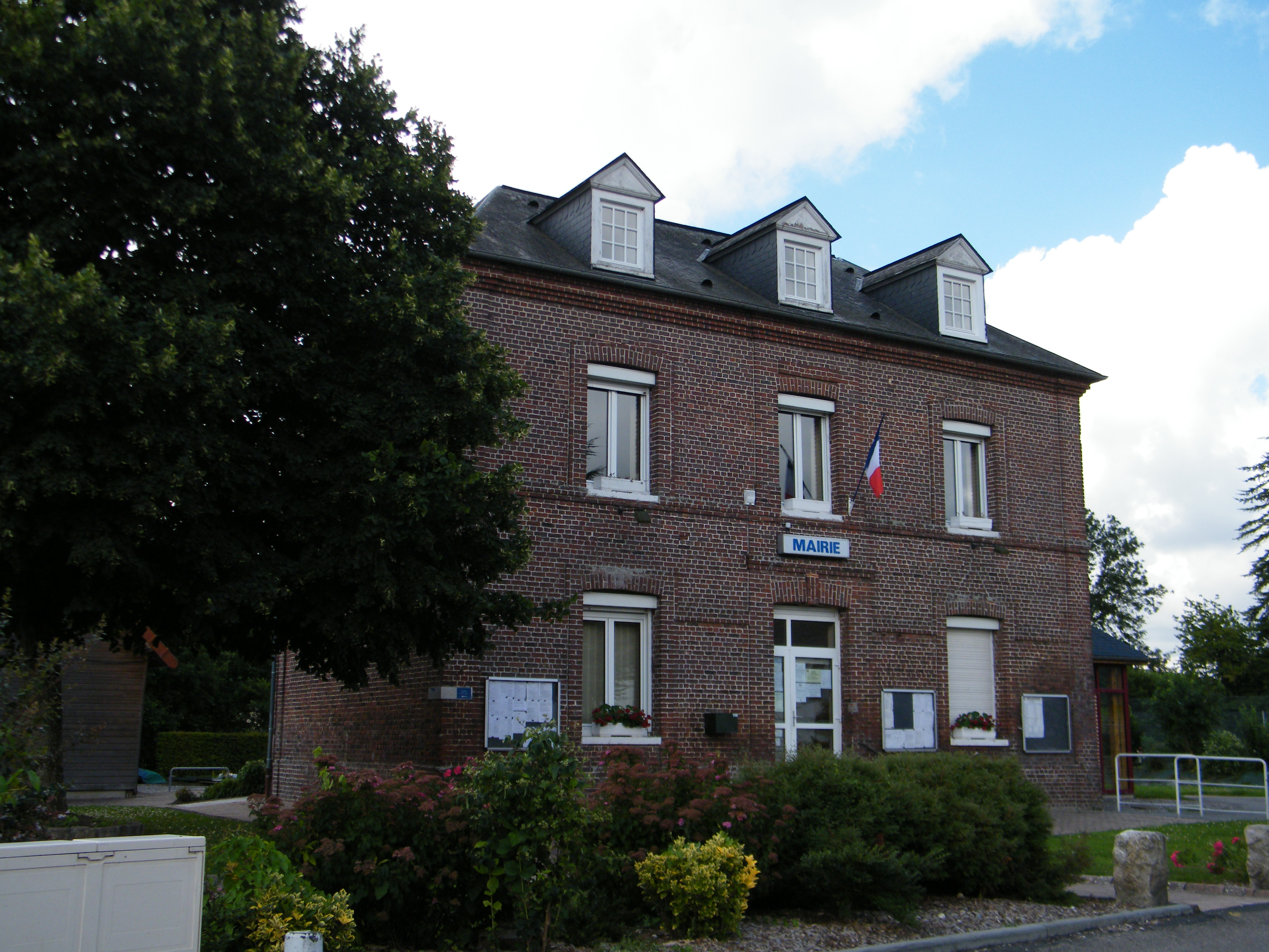 Ancourt, Seine-Maritime, France, mairie